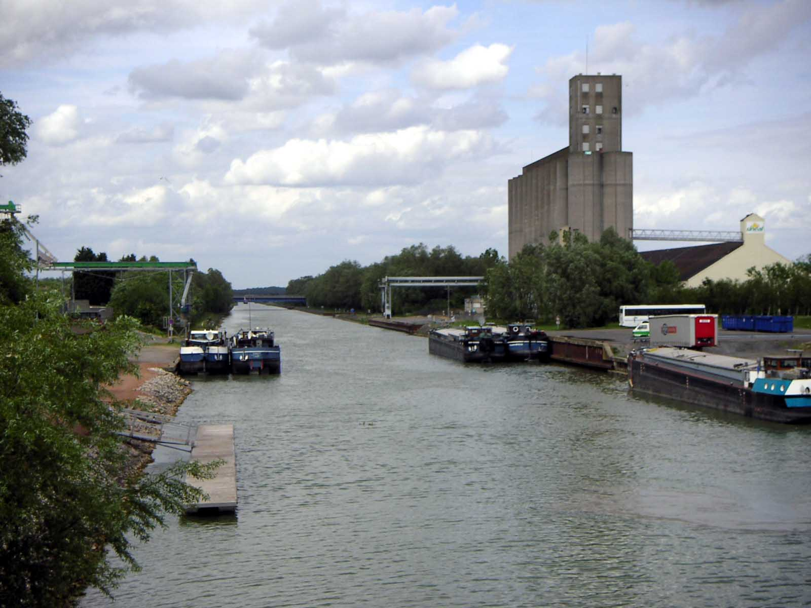 Port de Marquion sur le canal du nord le 21/05/05. (Padawane)